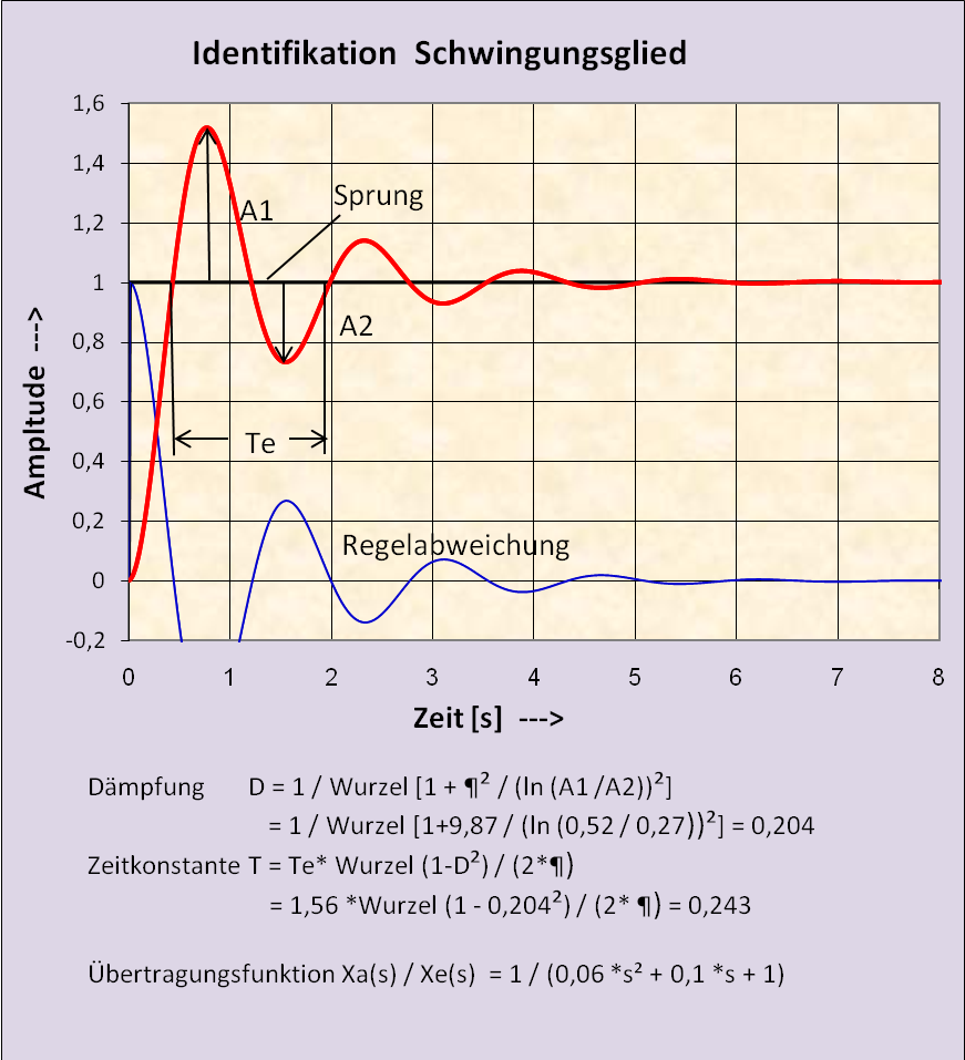 Identifikation eines PT2-Schwingungsgliedes nach der Sprungantwort